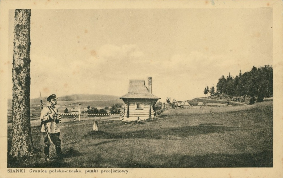 Sianki